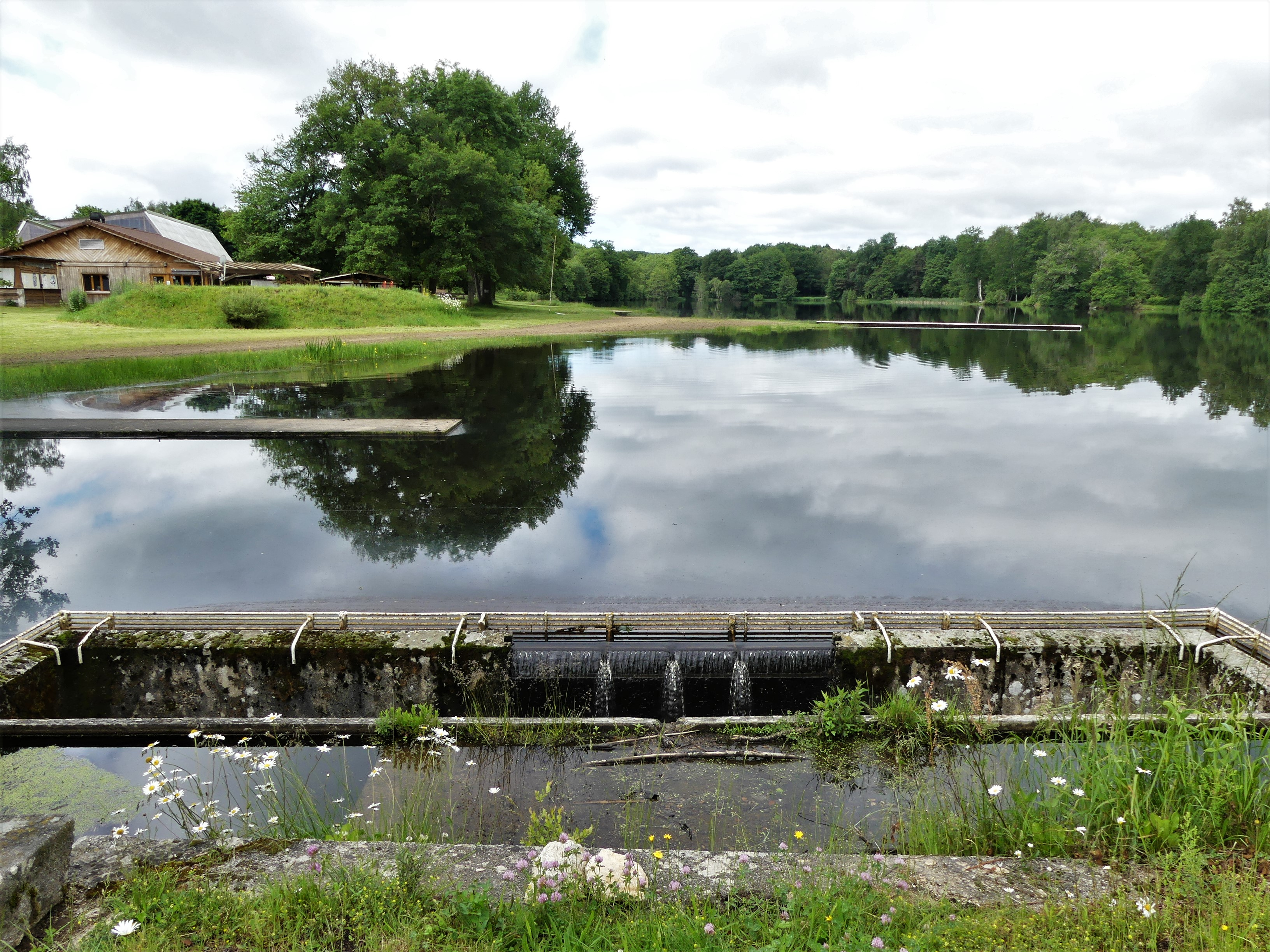 L'étang de la Naute et son déversoir, Champagnat, Creuse, France.